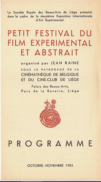 Affiche du manifeste de Jean Raine pour le cinéma abstrait à Liège - Hires color